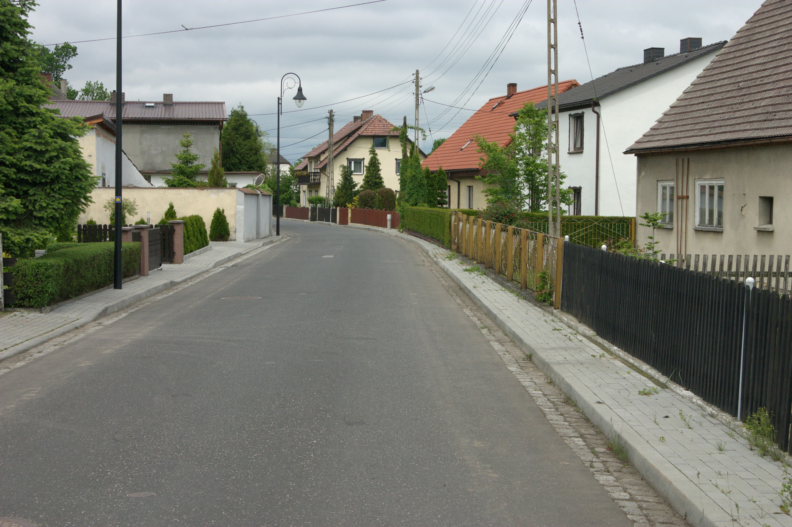 Ulica sw. Bronislawy, Kamien Slaski-Groß Stein